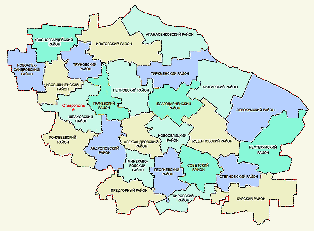 Адм.карта Ставропольского края